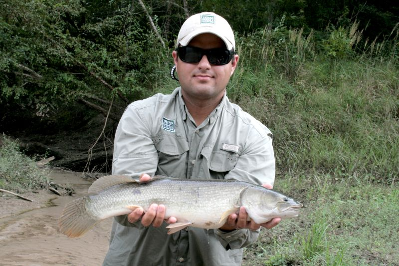 Bowfin (Amia calva)